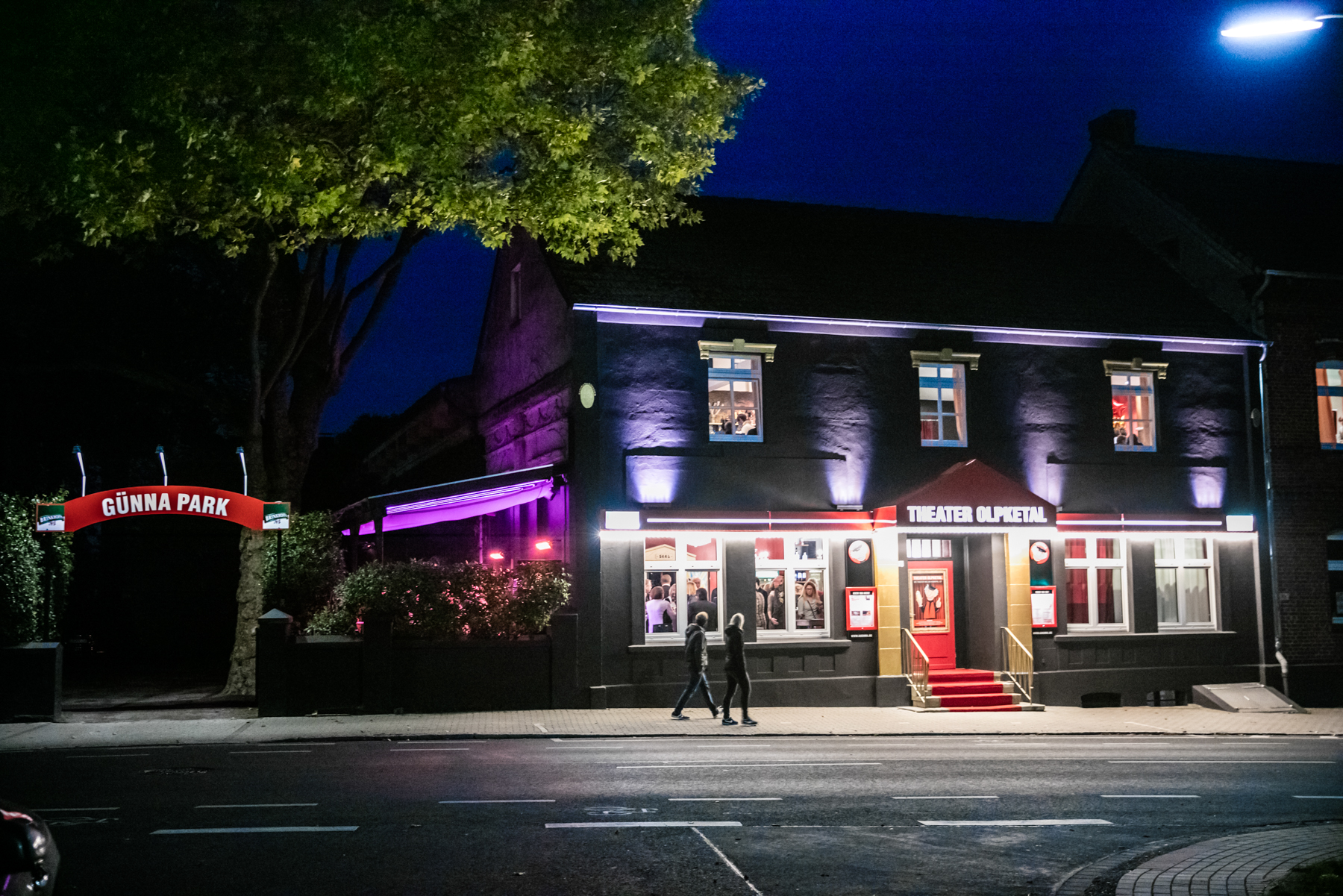 Das Theater Olpketal am Abend einer Veranstaltung